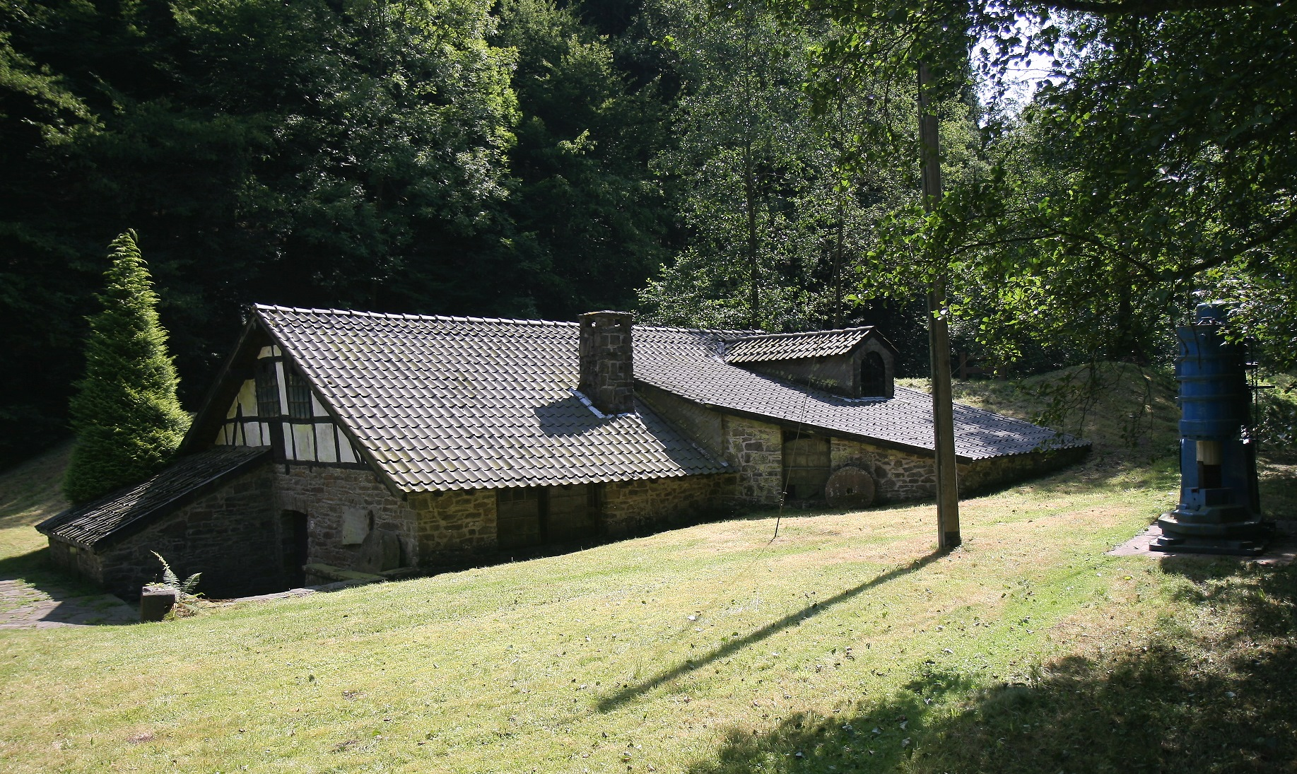 Schwarze-Ahe-Hammer in Herscheid.